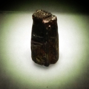 “郢爰”印模，青铜材质，战国时期文物，1984年在河南省信阳市息县出土。